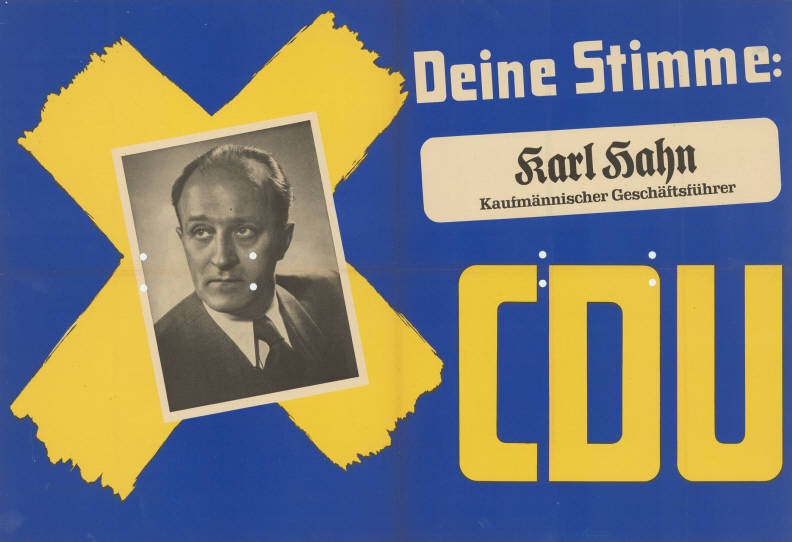 Deine Stimme: Karl Hahn Kaufmännischer Geschäftsführer CDU Abbildung: Porträtfoto - Stimmkreuz Plakatart: Kandidaten-/Personenplakat mit Porträt Objekt-Signatur: 10-009 : 200 Bestand: Landtagswahlplakate Nordrhein-Westfalen (10-009) GliederungBestand10-18: Landtagswahlplakate Nordrhein-Westfalen (10-009) » Landtagswahl am 18.6.1950 » CDU » mit Porträtfoto Lizenz: KAS/ACDP 10-009 : 200 CC-BY-SA 3.0 DE